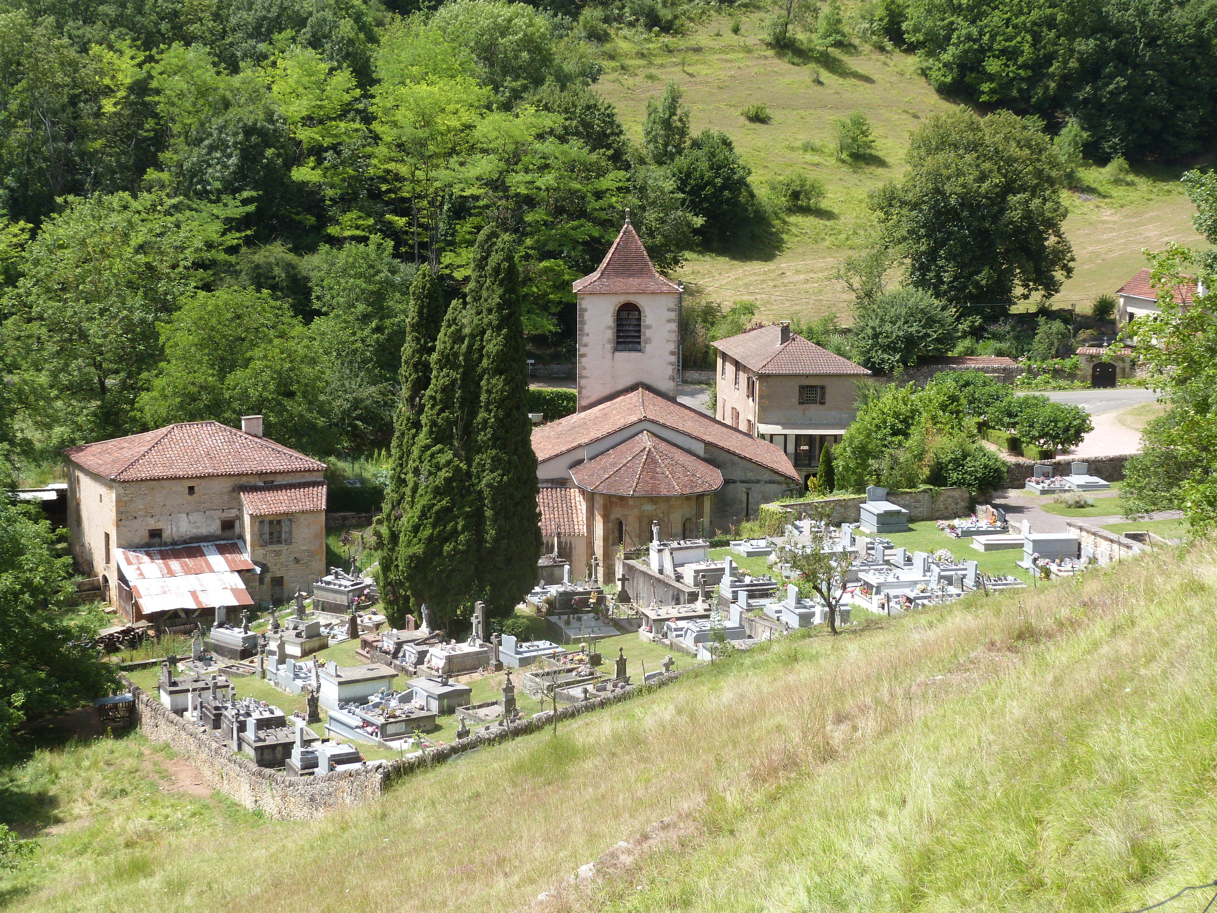 Église Saint-Martin de Lunan, dans le Lot (France), avec son cimetière .